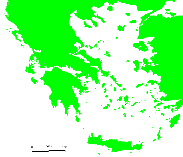 GR Iraklia.PNG (Greek island)